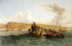 “Die Britse setlaars van 1820 land in Algoabaai”, deur Thomas Baines, 1853.